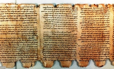 死海文書を名乗っているものの一部